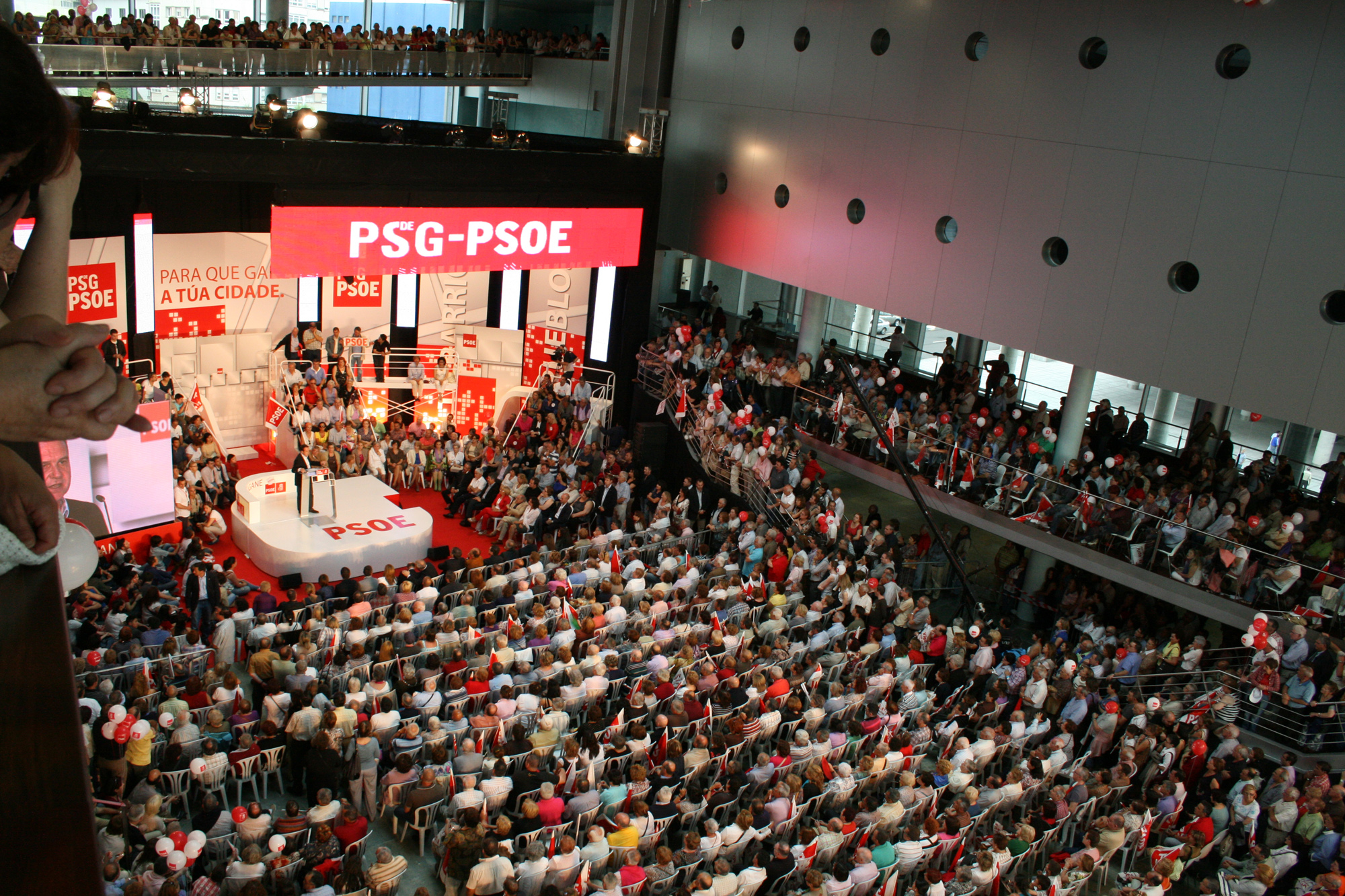 Mitin del Partido Socialista Obrero Español (PSOE) en Vigo (Galicia, España), con la participación del Ministro del Interior, Alfredo Pérez Rubalcaba. 17 de mayo de 2011. Rubalcaba in Vigo Meeting of the Spanish Socialist Workers' Party (PSOE) in Vigo (Galicia, Spain), with the participation of Interior Minister Alfredo Pérez Rubalcaba. May 17th 2011.